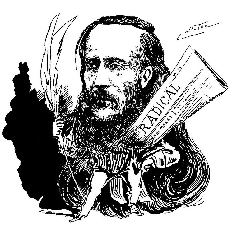 "Silhouettes parisiennes - Henry Maret."